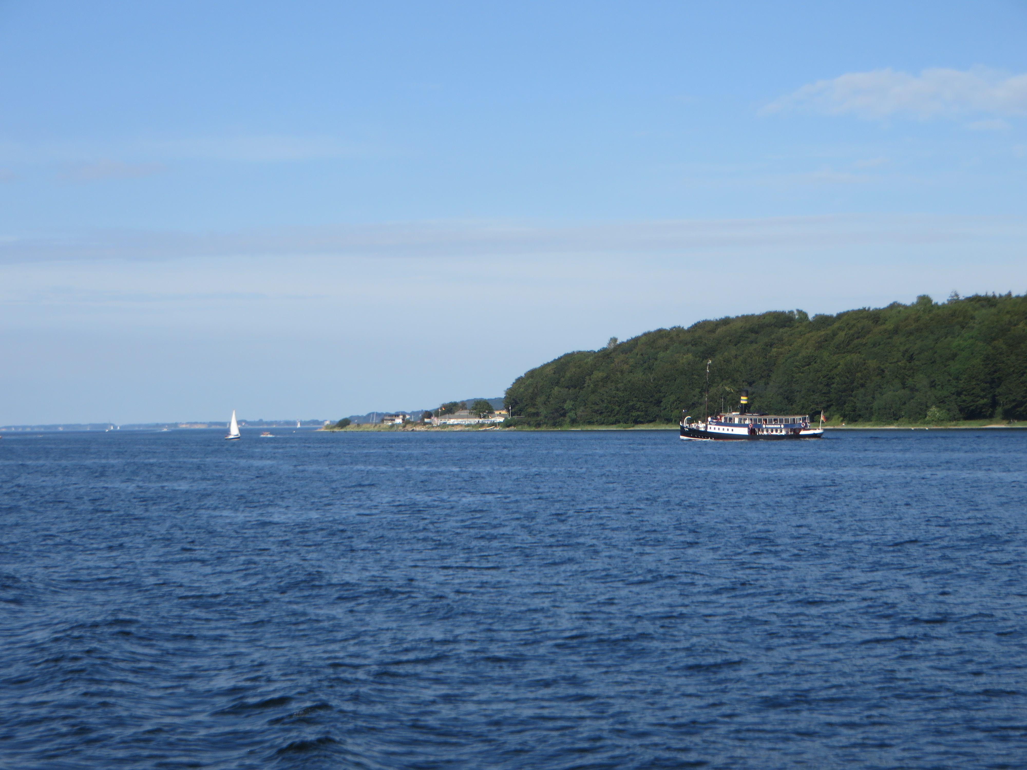 Alexandra bei Fahrensodde (Flensburg-Mürwik 2015), Bild 01